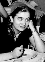 Suomalainen näyttelijä Ritva Valkama (s. 1932) vuonna 1954 tai 1955 Teatterikoulun pikkujouluissa.